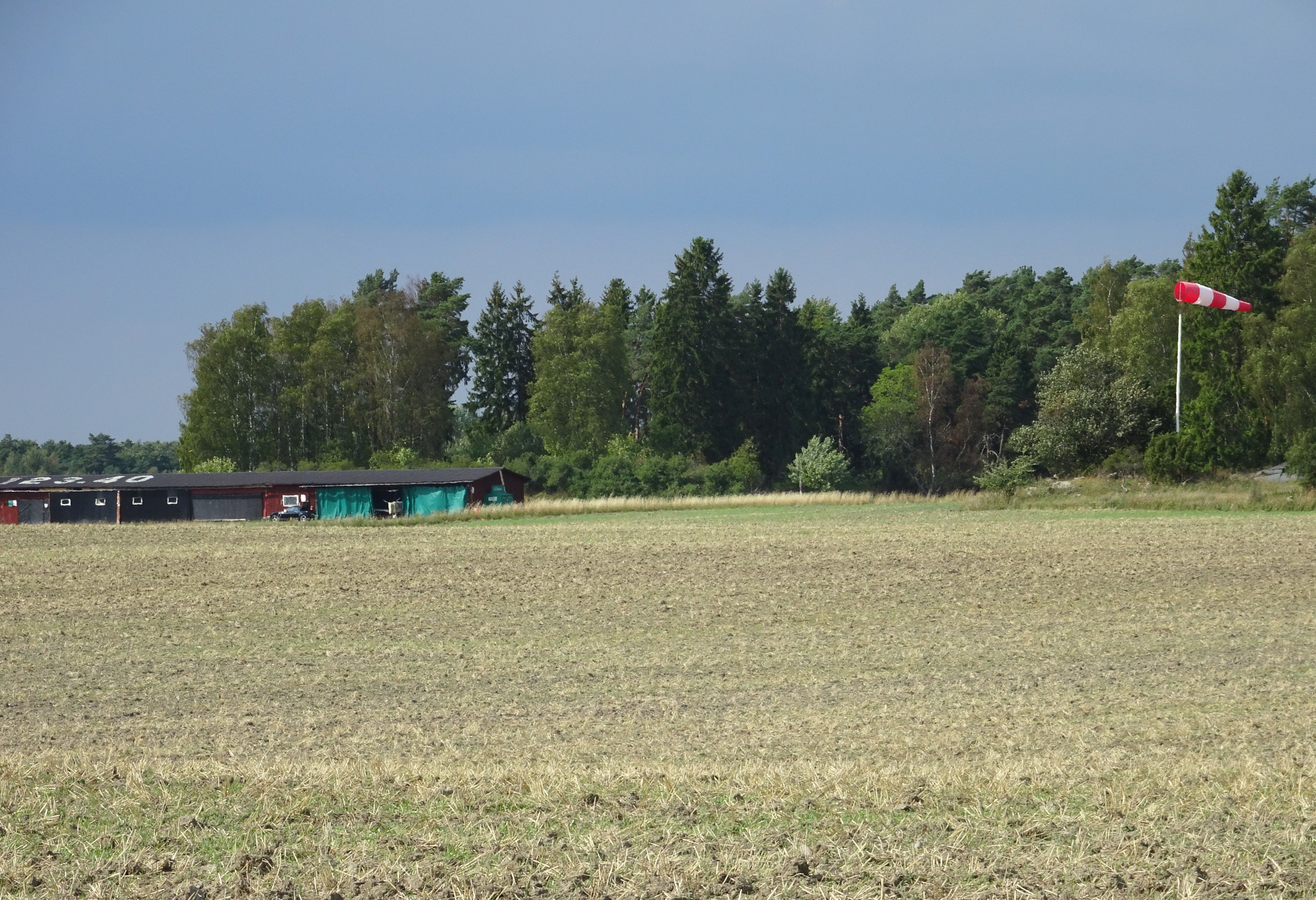 Frölund flygfält, Upplands-Bro kommun